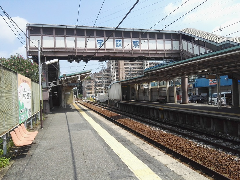 Uto station platform